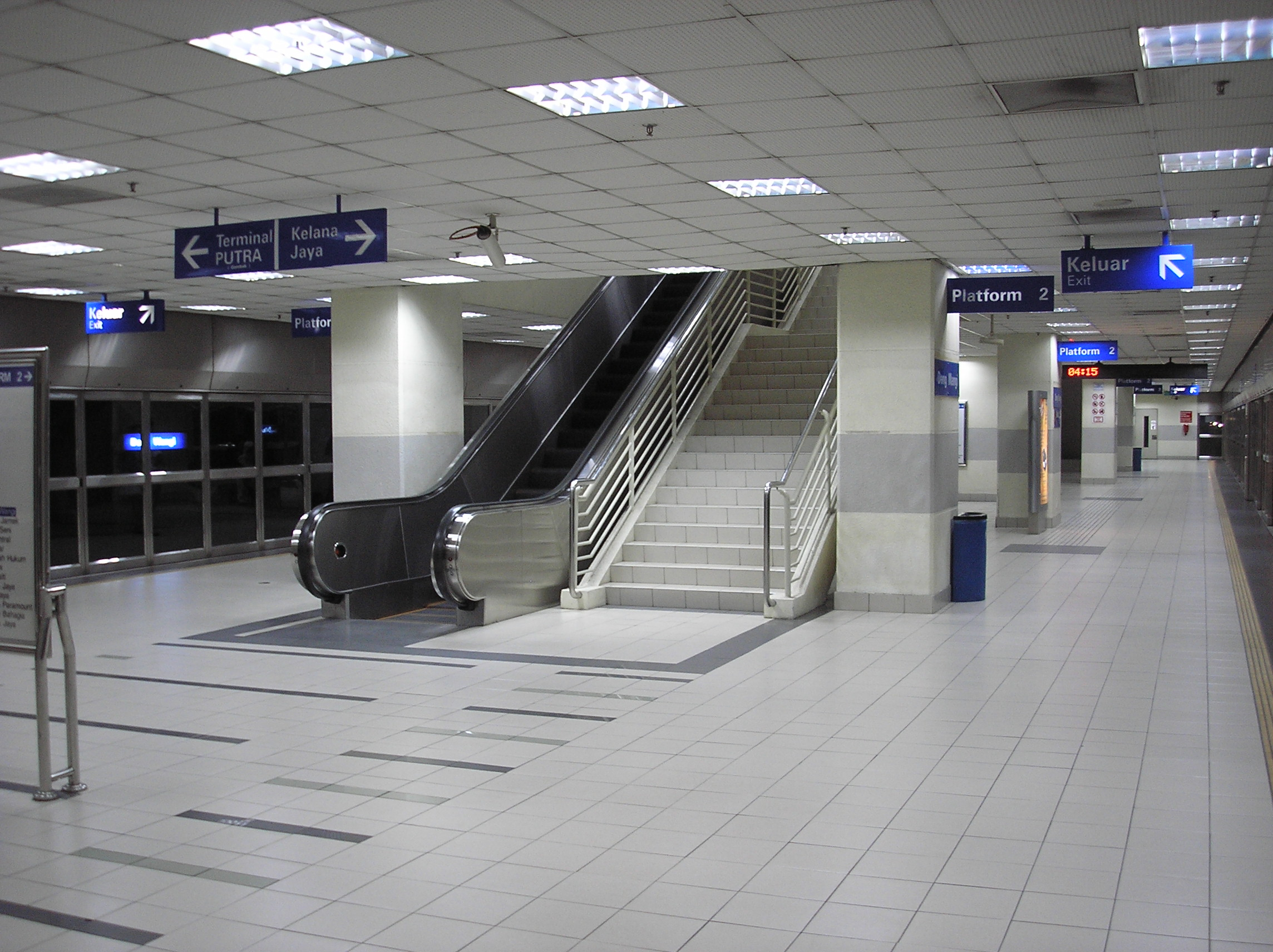 The Dang Wangi LRT station (Kelana Jaya Line), Kuala Lumpur, Malaysia.